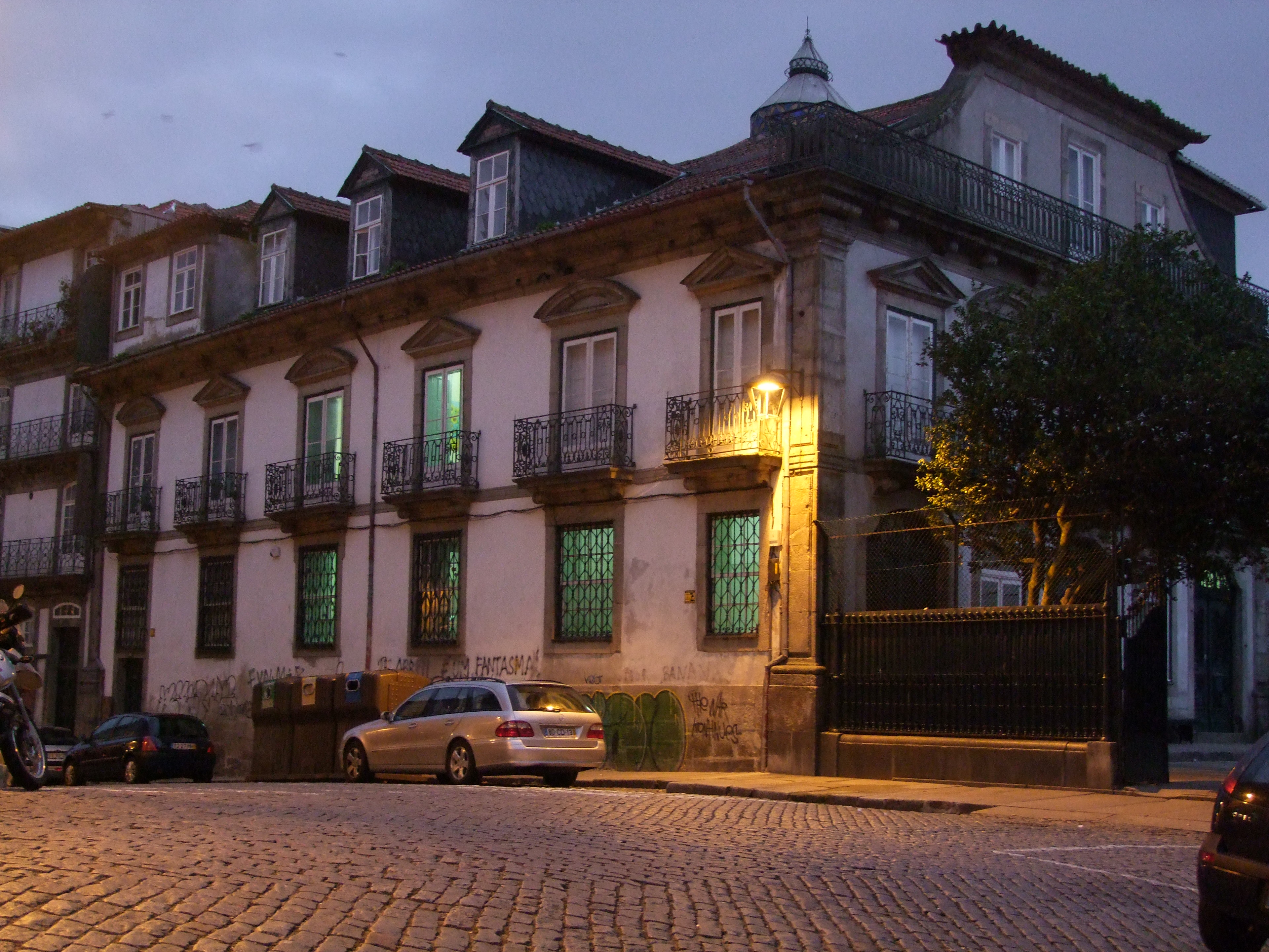 Antigo Clube dos Ingleses, Miragaia, Porto, Portugal (DSCF2096)